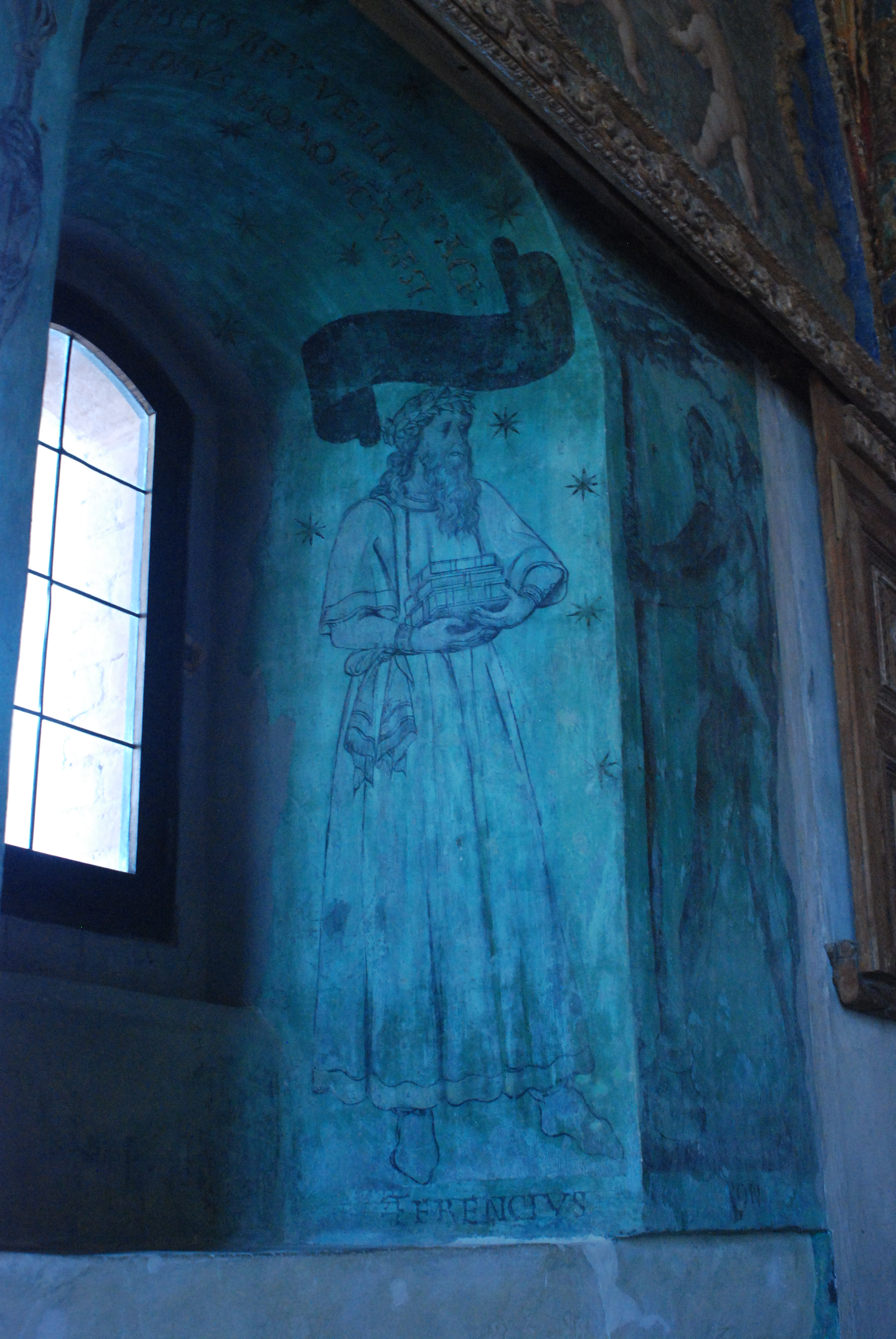 Castello di Torrechiara - MIBAC Camera degli Sposi, particolare della finestra This is a photo of a monument which is part of cultural heritage of Italy.